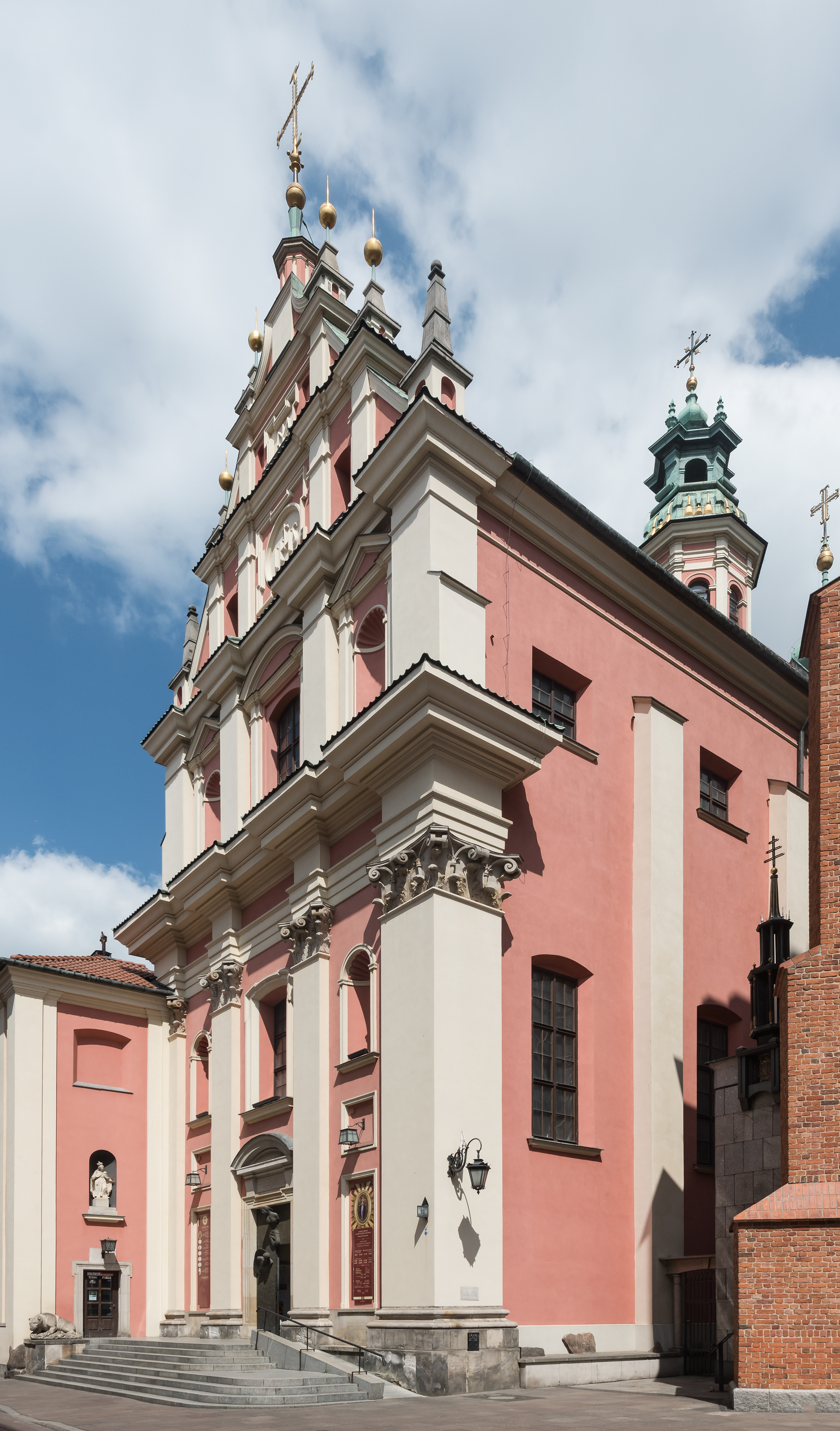 Kościół Matki Bożej Łaskawej (jezuitów) przy ul. Świętojańskiej w Warszawie